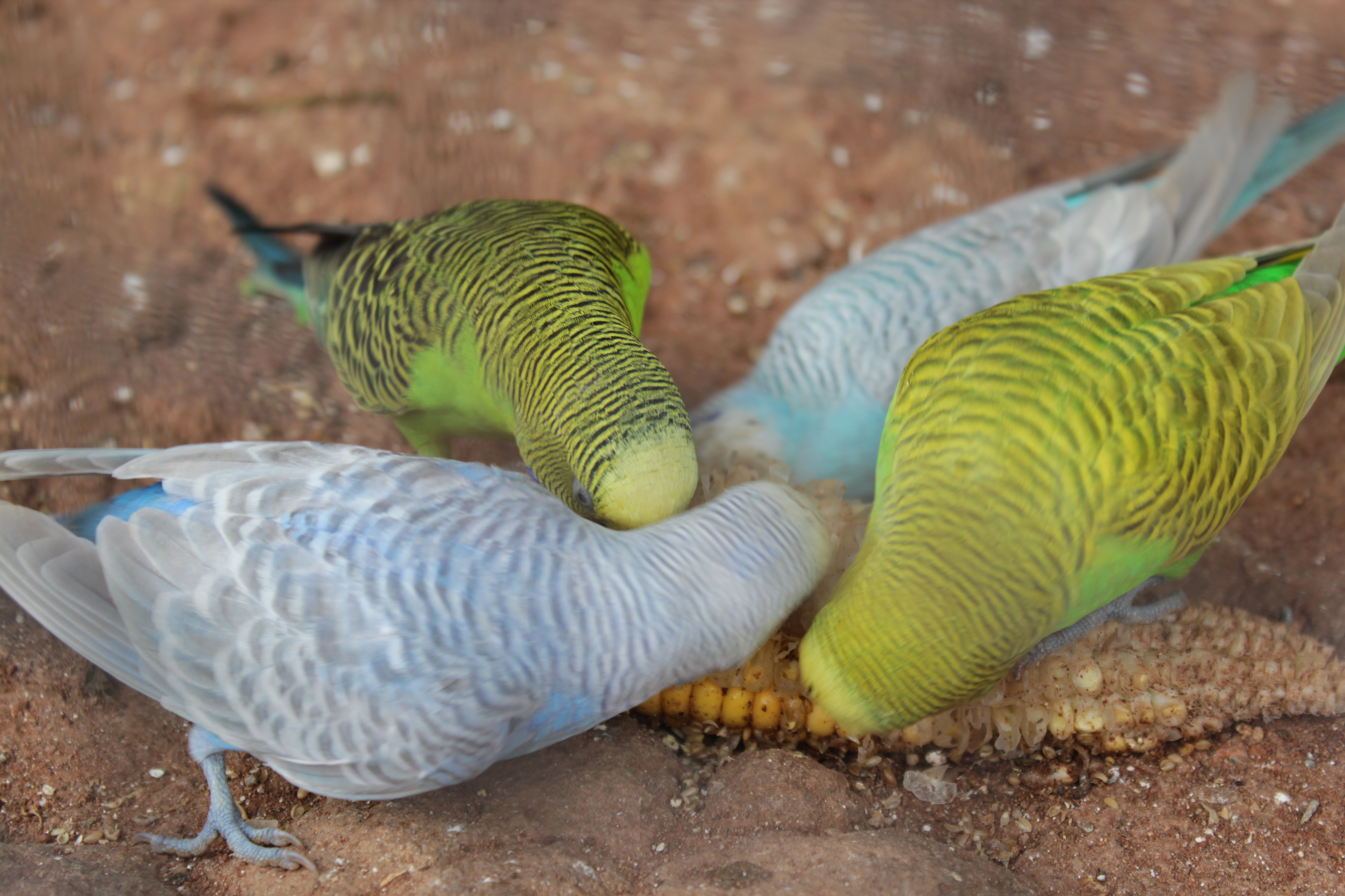 பறவை உணவு நேரம்